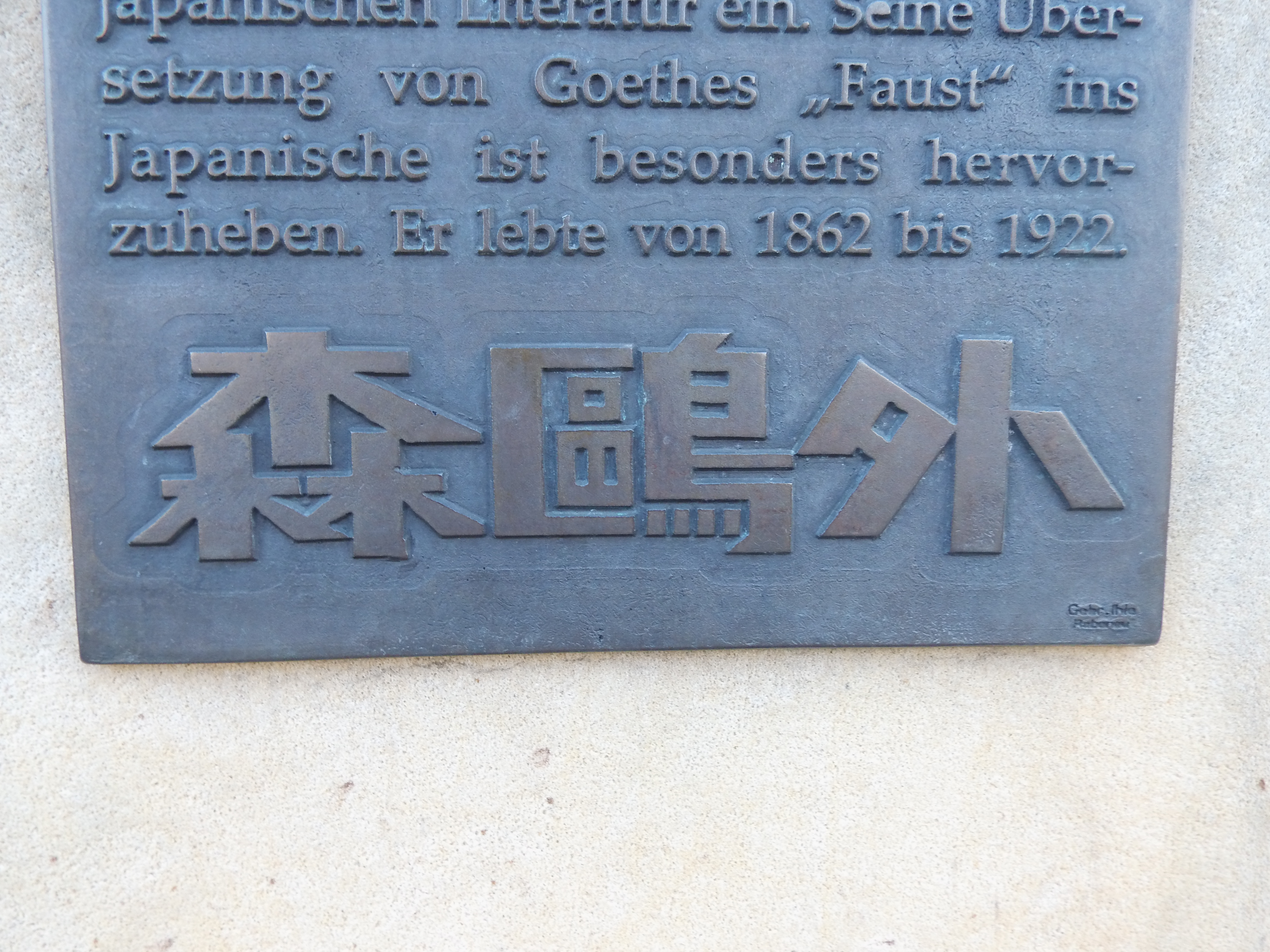 Gedenktafel in Machern für Mori Ōgai (unterer Teil)